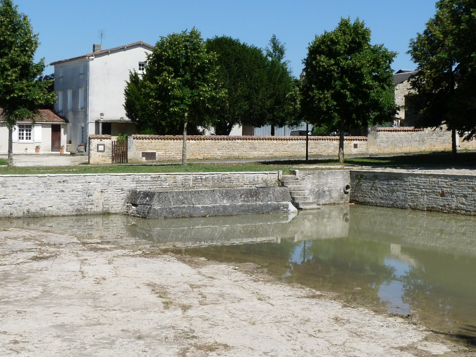 Mare de Raix, Charente, France